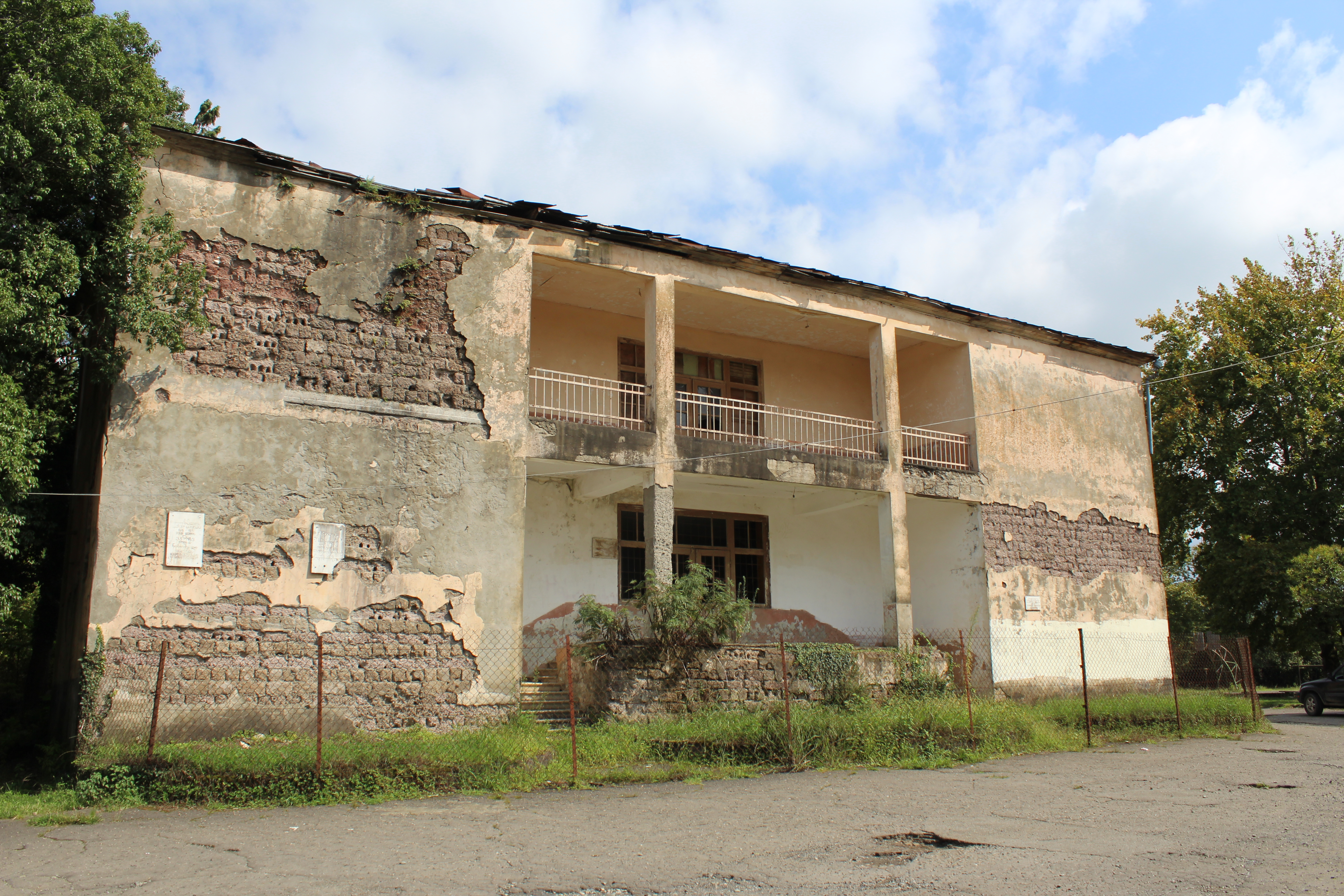 პირველი საჯარო სკოლის ძველი შენობა